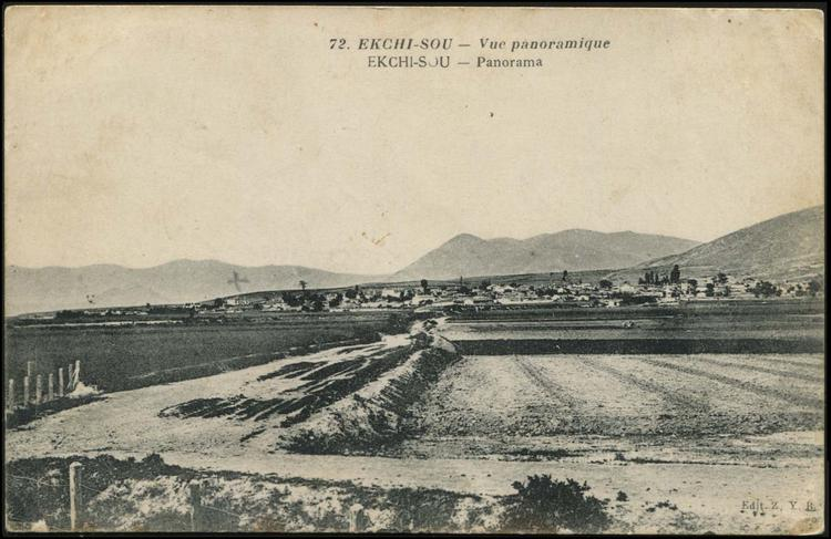 Екши Су през Първата световна война.